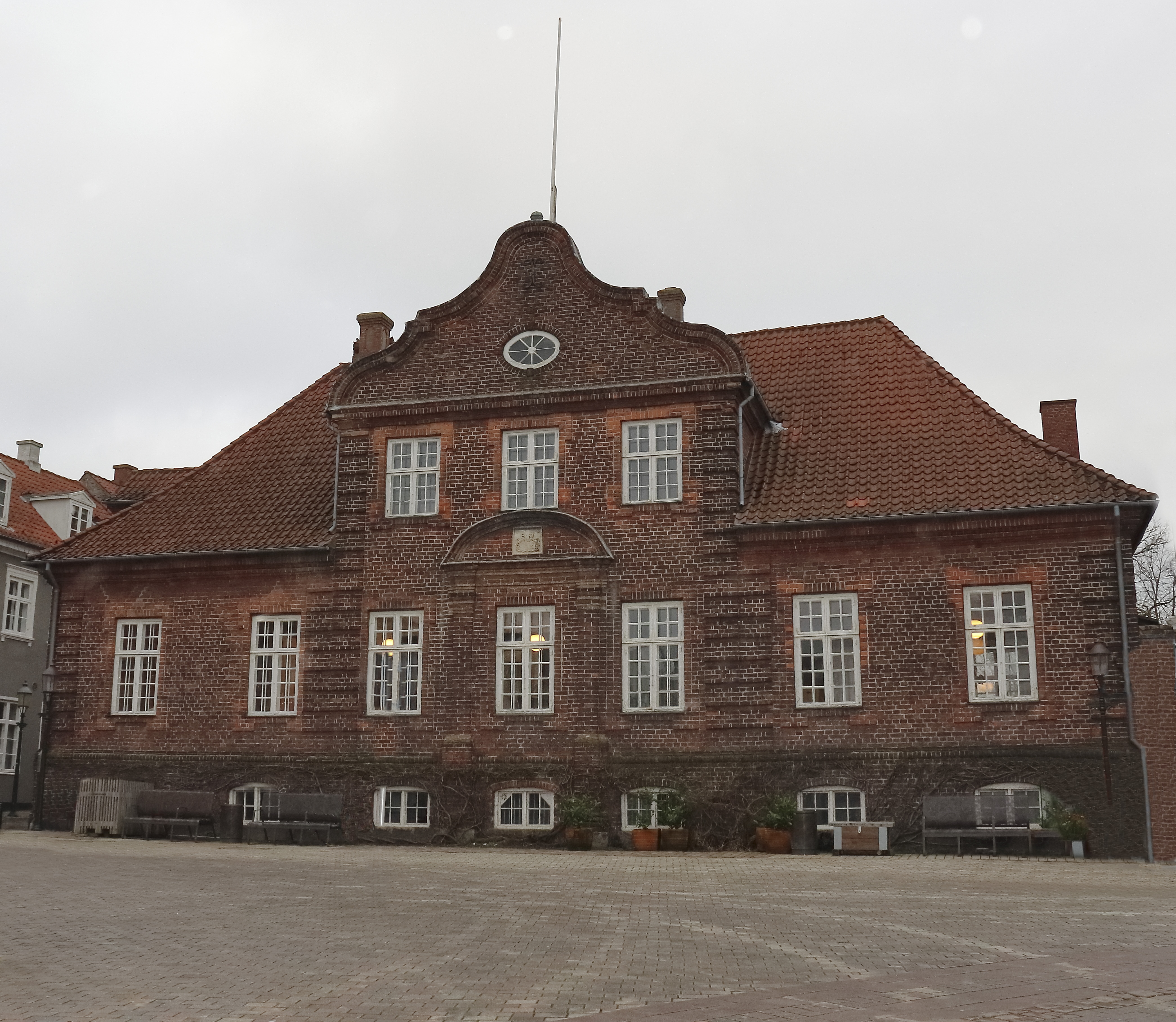 Stiftamtmandens tjenestebolig i Viborg